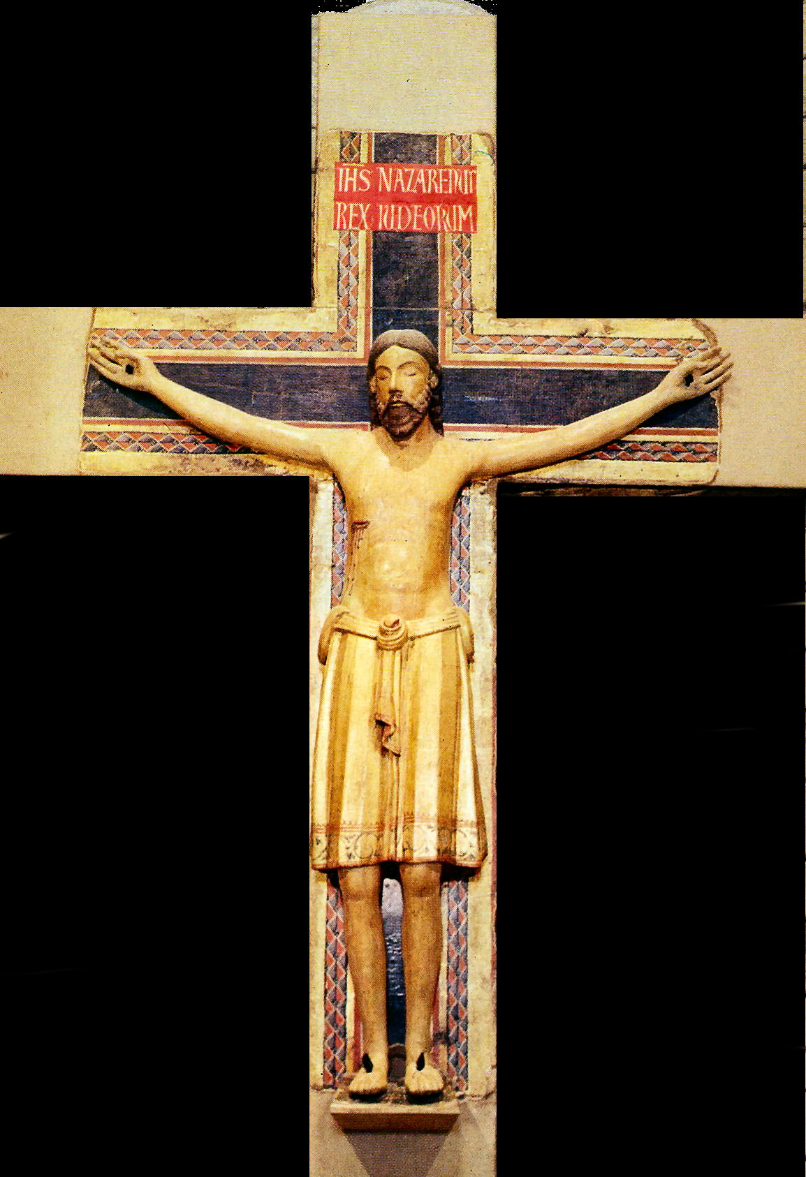 Cristo ligneo di san vincenzo a torri, scandicci